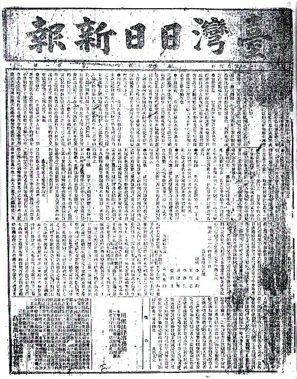 1898年的《台灣日日新報》創刊號。